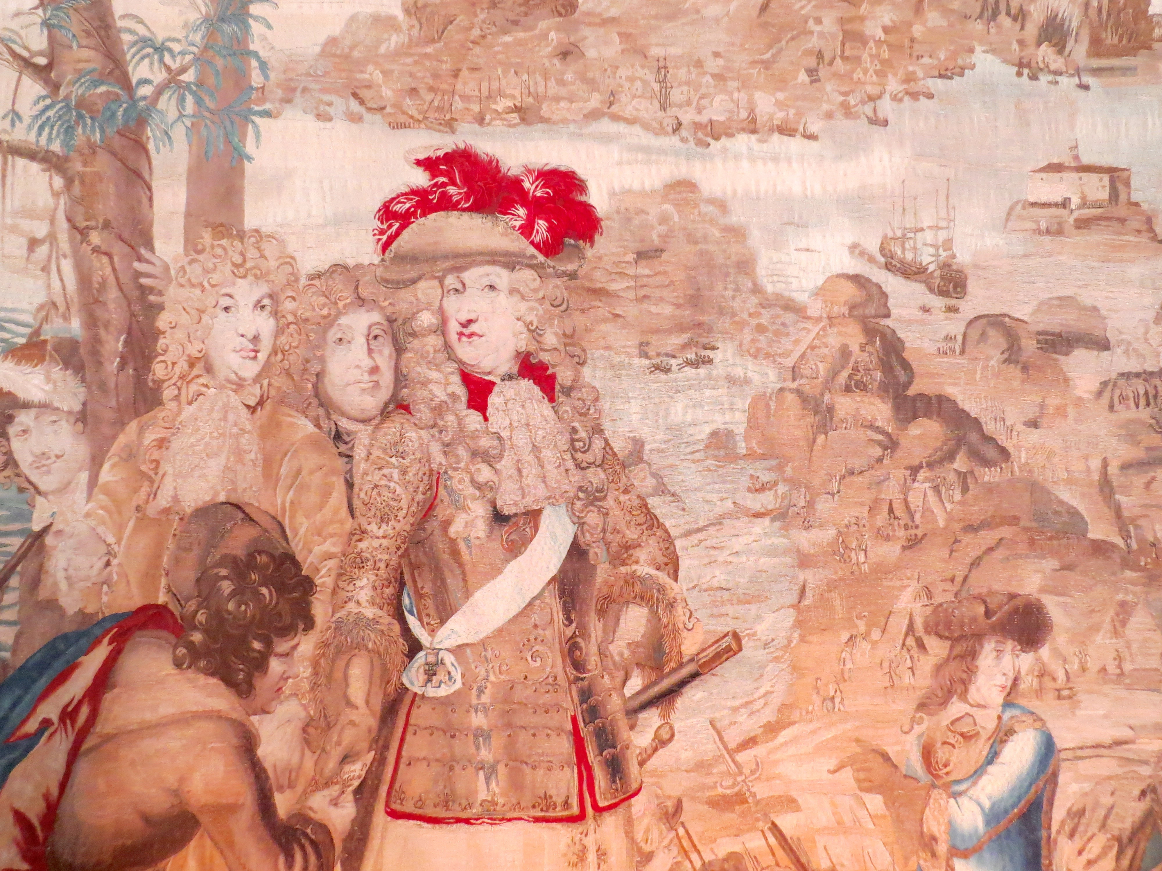 Detalje fra indtagelsen af Marstrand og fæstningen Karlsteen i 1677, med Norges statholder Ulrik Frederik Gyldenløve som modtager kapitulationsbrevet. Detalje fra gobelin vævet af Berent van der Eichen, Rosenborg Slot, København